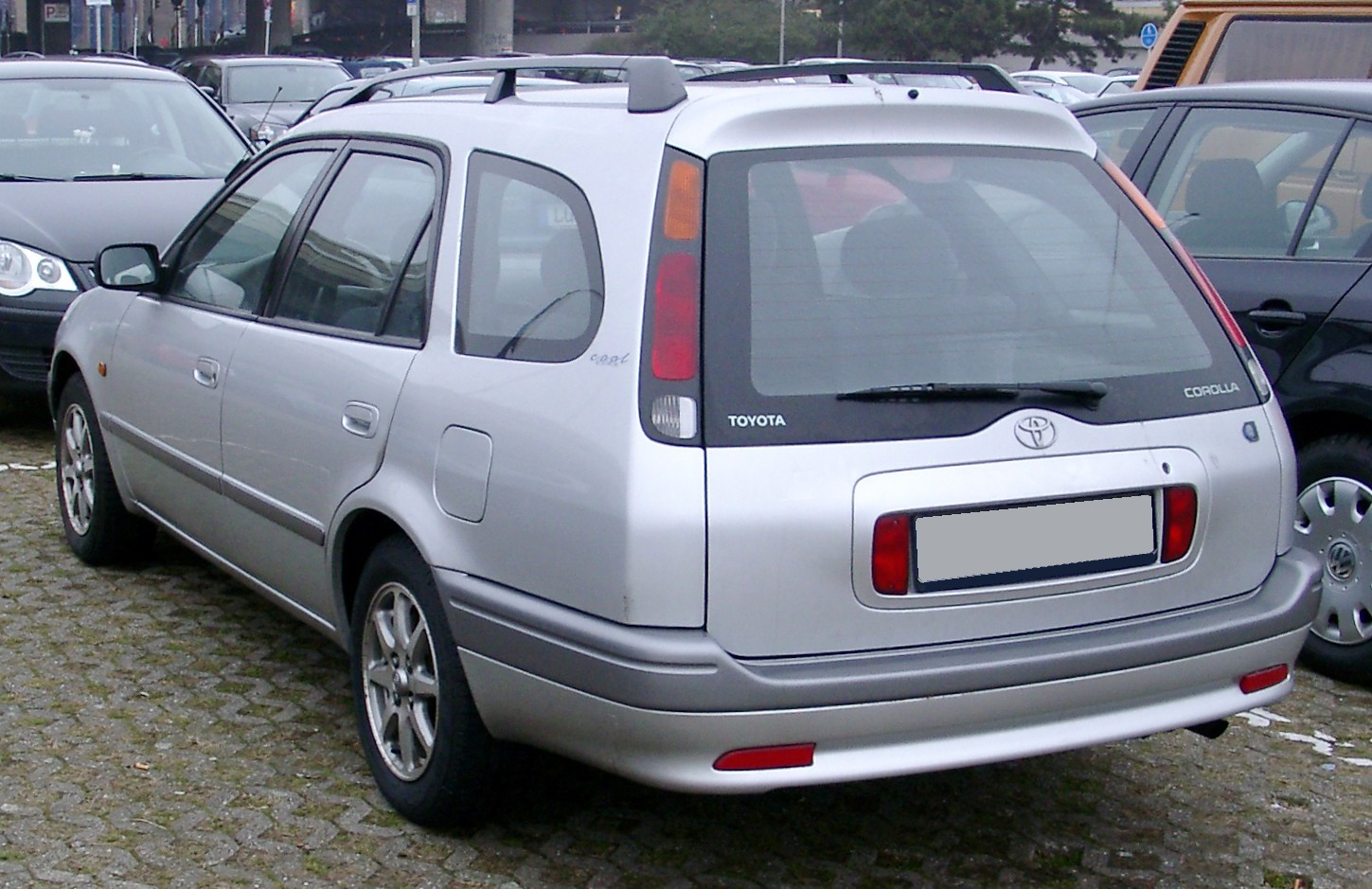 Toyota Corolla E11 Kombi